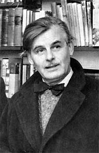 Stig Södersten